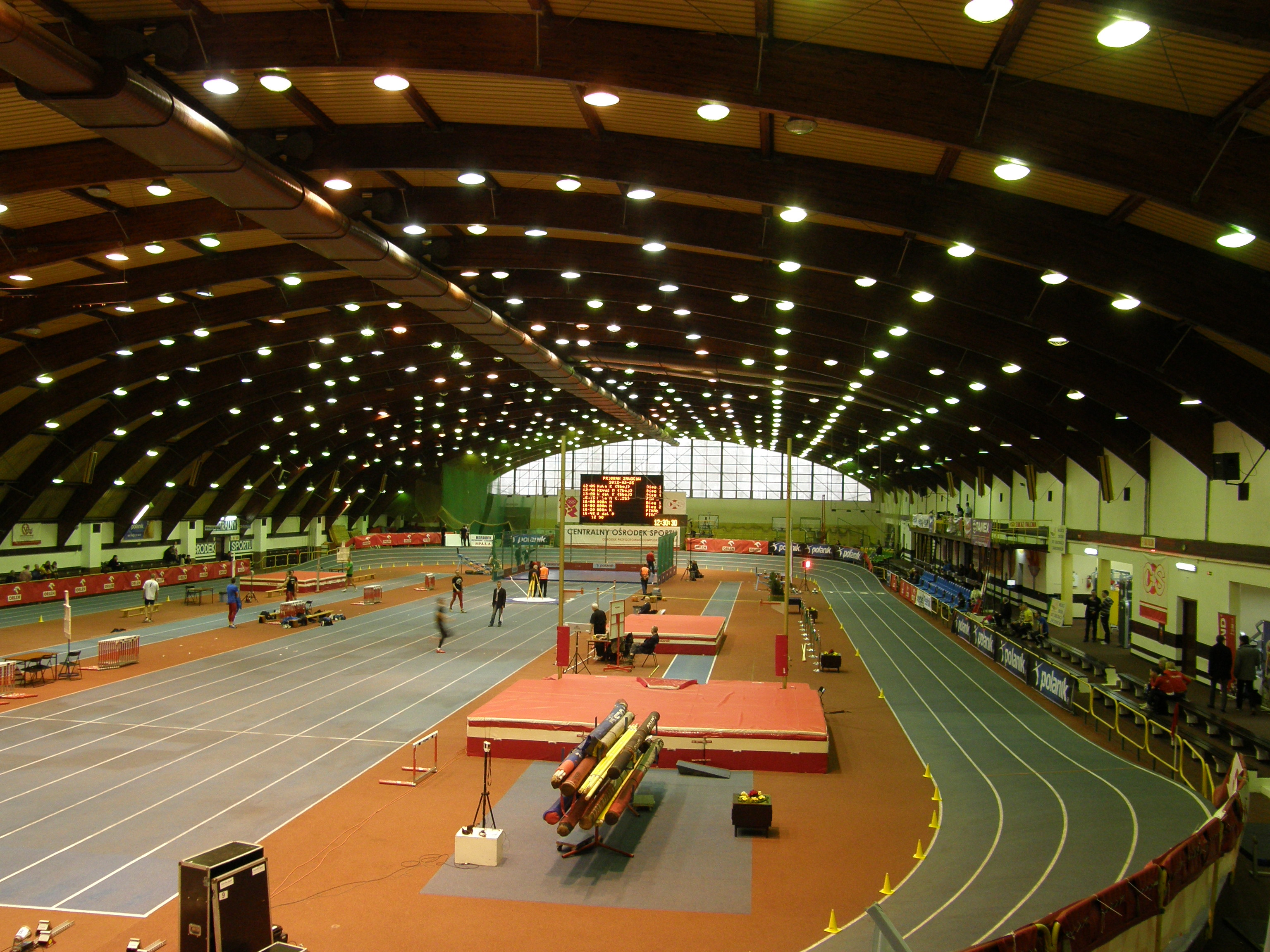 Hala lekkoatletyczna w Centralnym Ośrodku Sportu (Ośrodku Przygotowań Olimpijskich) w Spale.